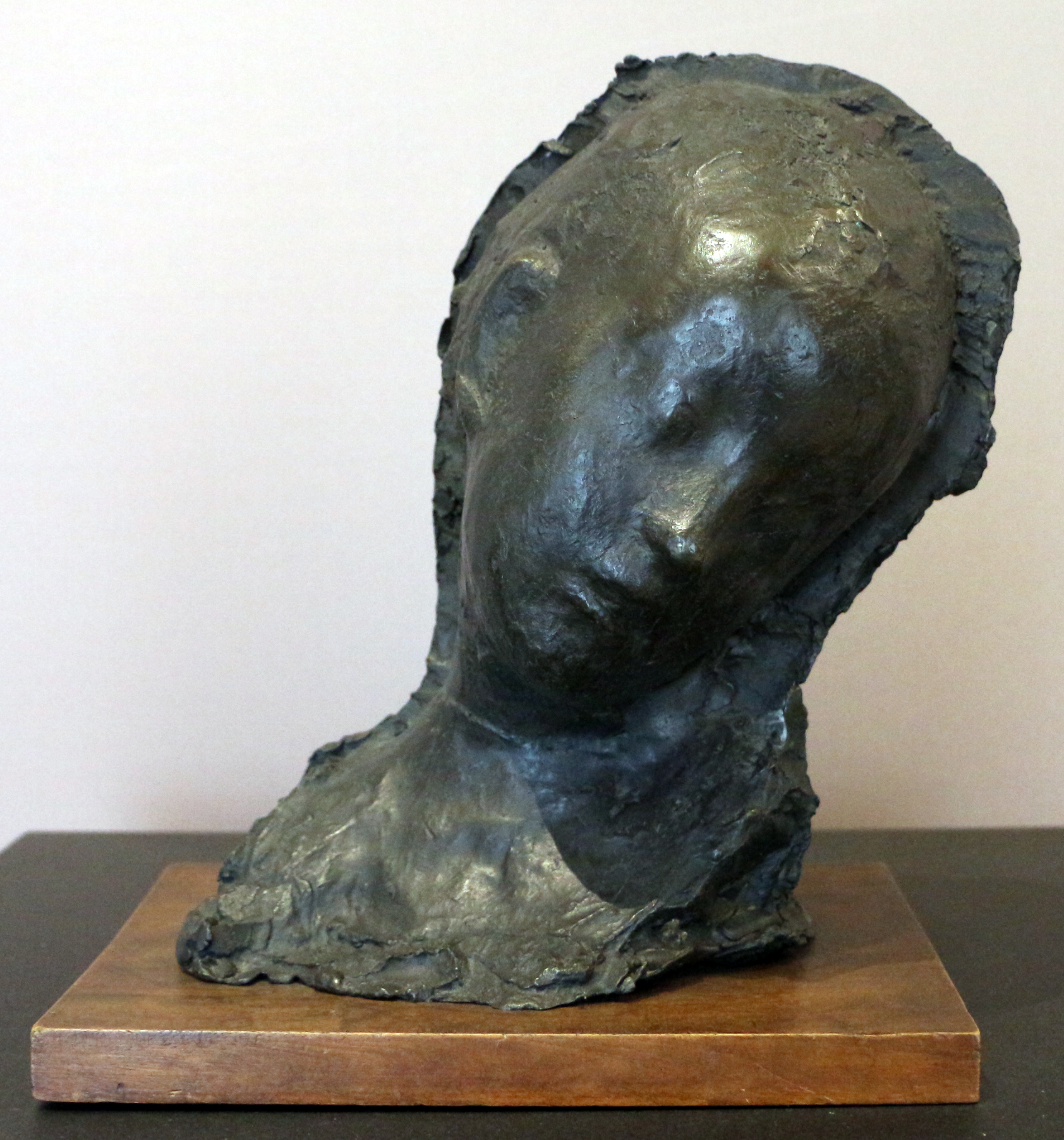 Villa Reale di Milano This is a photo of a monument which is part of cultural heritage of Italy.